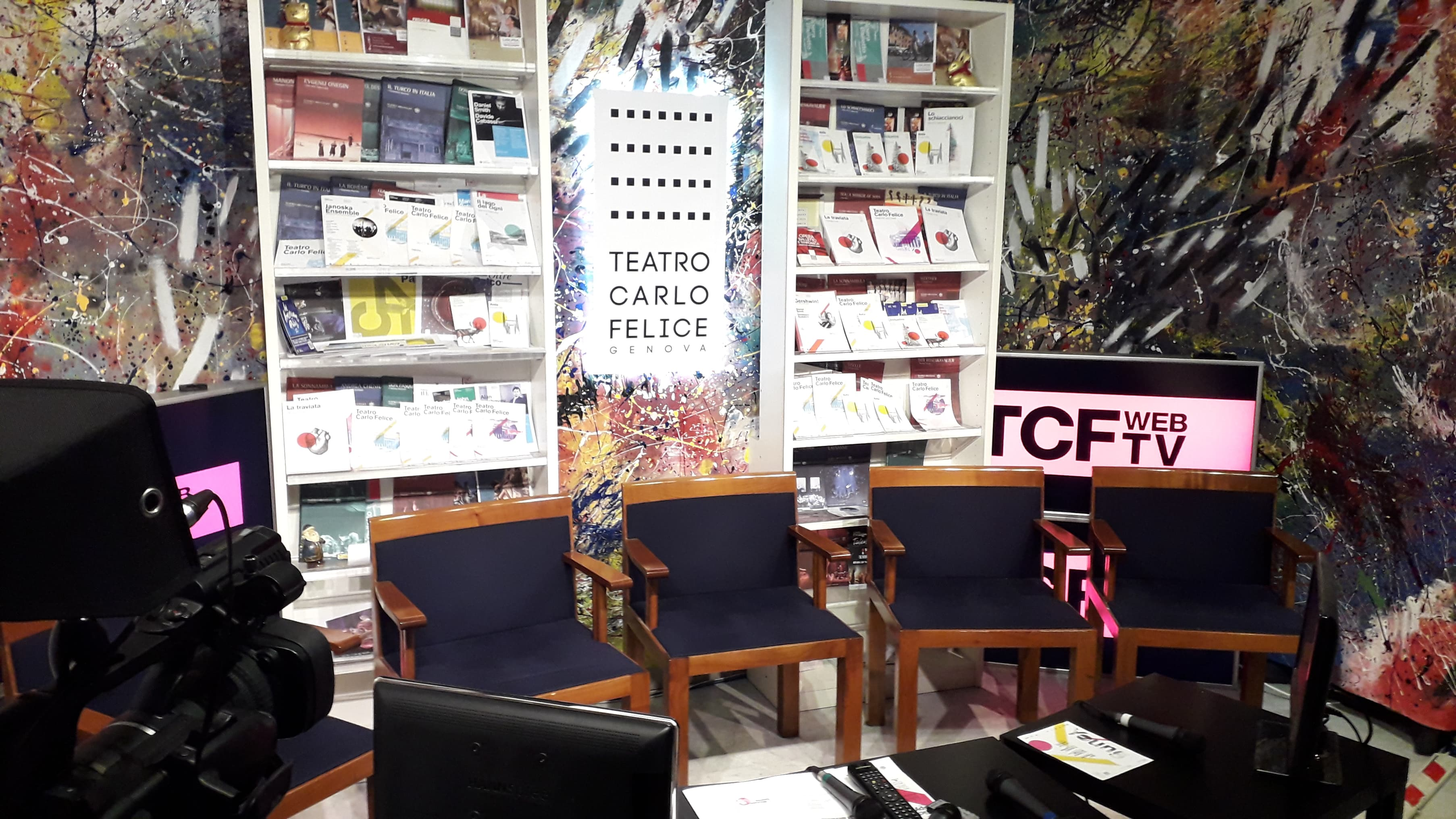 Lo studio della TCF web TV si trova al 6° piano del Teatro Carlo Felice